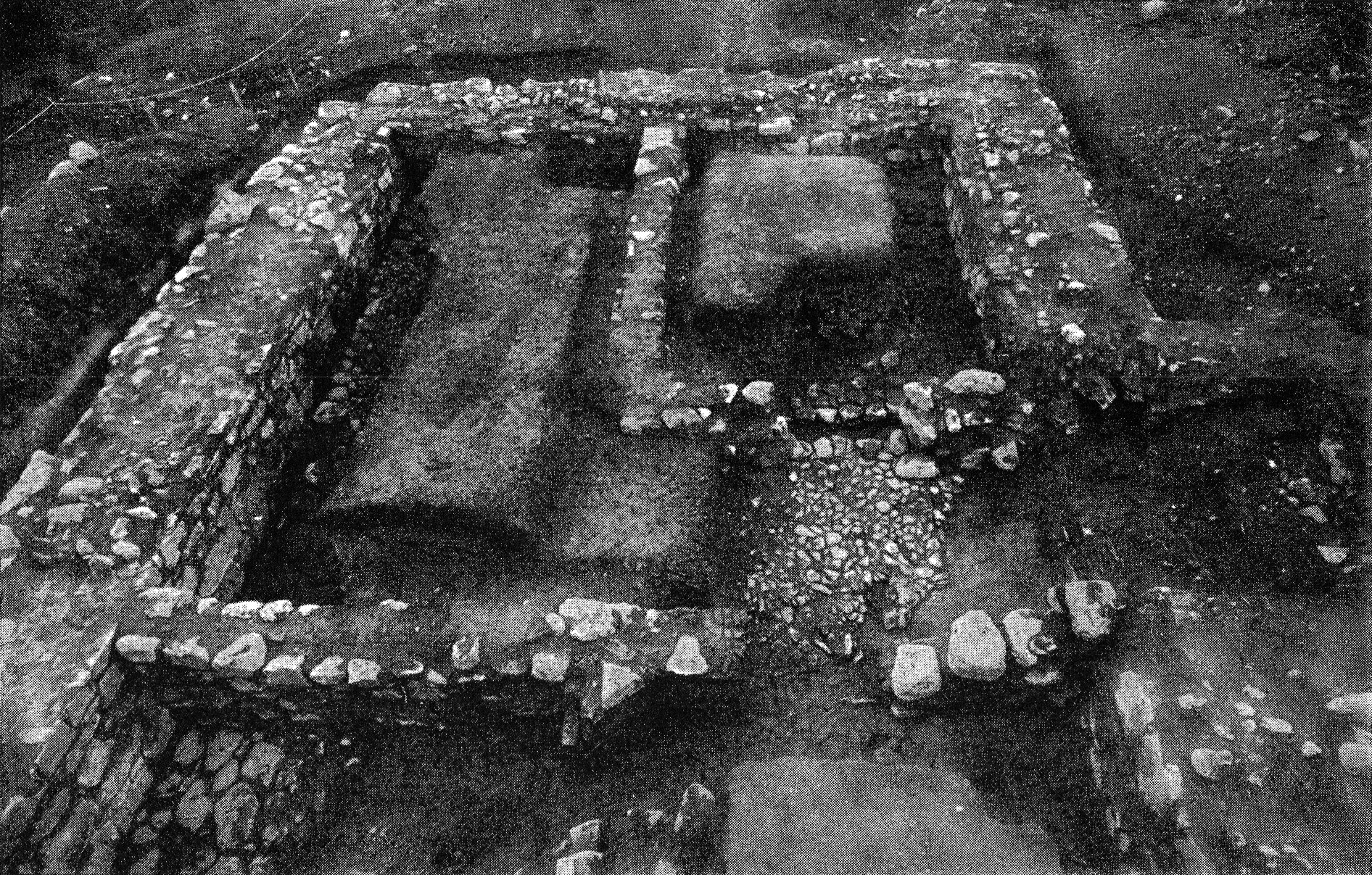 Tyresöhus utgrävning